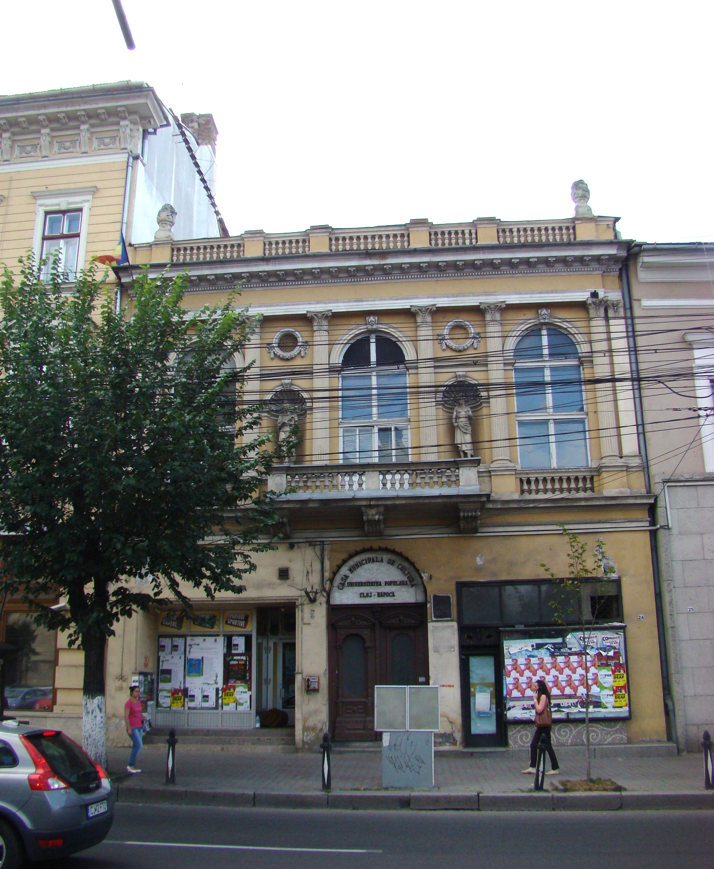 Casă monument istoric, Piața Unirii 24